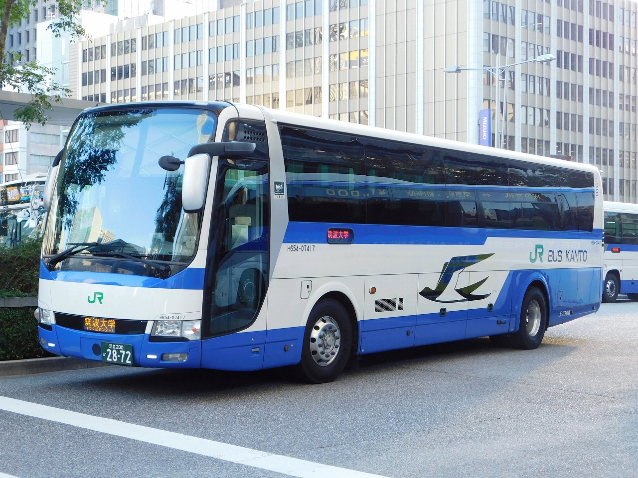 ジェイアールバス関東 三菱ふそう・エアロエース高速バス「つくば号」（東京駅 - 筑波大学）で運用中